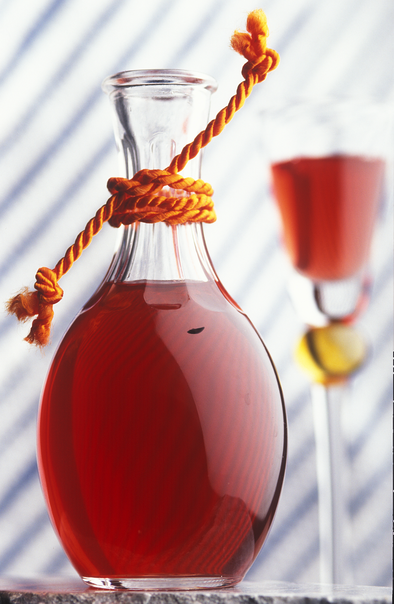 nalewka porzeczkowa wykonana w domu